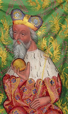 Václav IV., Karel IV. a Jošt Moravský